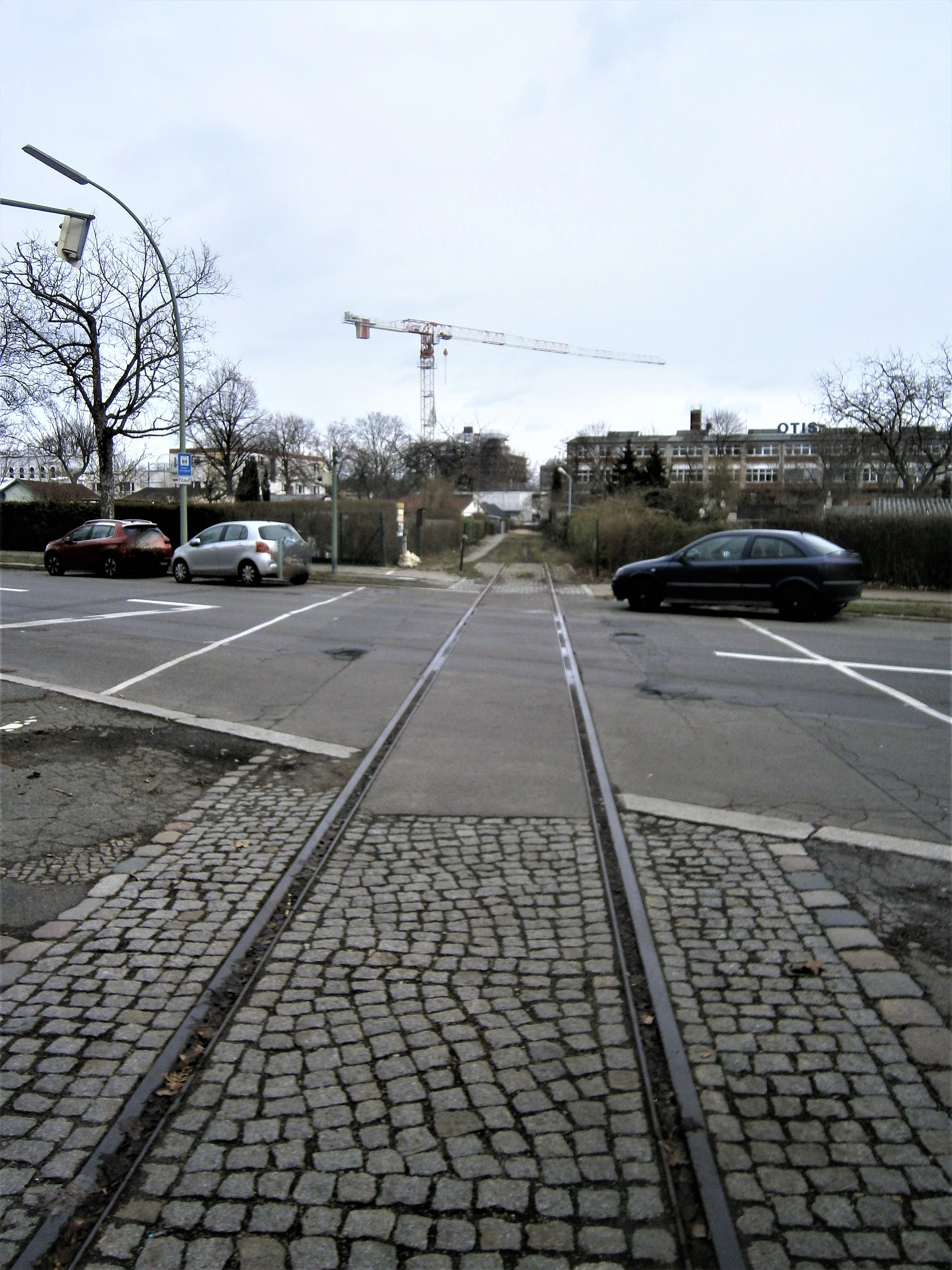 Vom Bahnhof Tegel lag ein Anschlussgleis zur Firma Flohr-Otis. Durch dessen Verlängerungüber die und dann parallel zur Seidelstraße wurde zum besseren Transport von Kriegsgerät wie Panzern eine Gleisverbindung zum Kurt-Schumacher-Damm zur Kaserne im französischen Sektor von Berlin hergestellt.